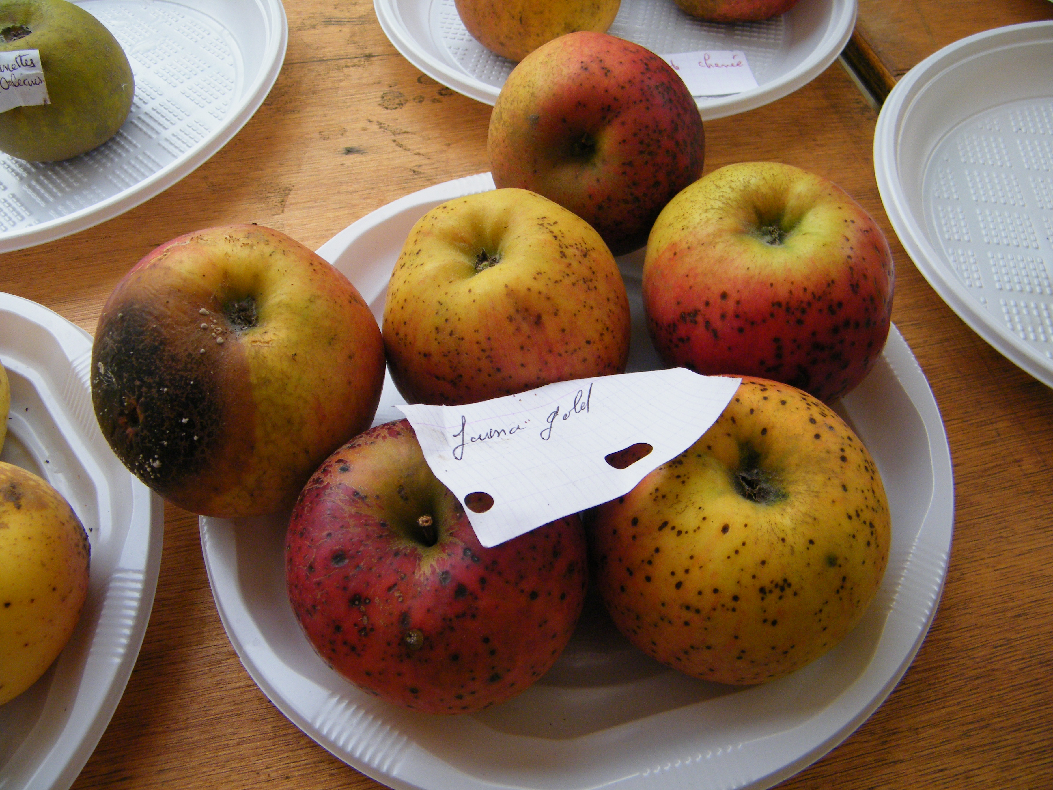 Jonagold, Mons-Boubert, Somme, Fr, expo du 29-10-2017 (21)